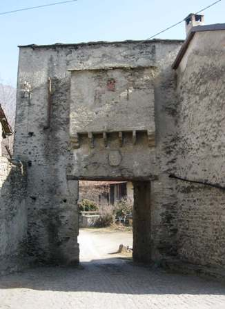 Castello di Bruzolo, la Porta Granda Vista da Ovest